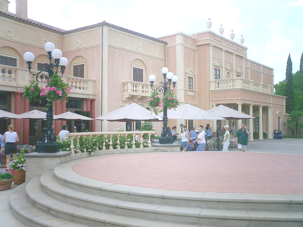 מבט על הביתן האיטלקי.